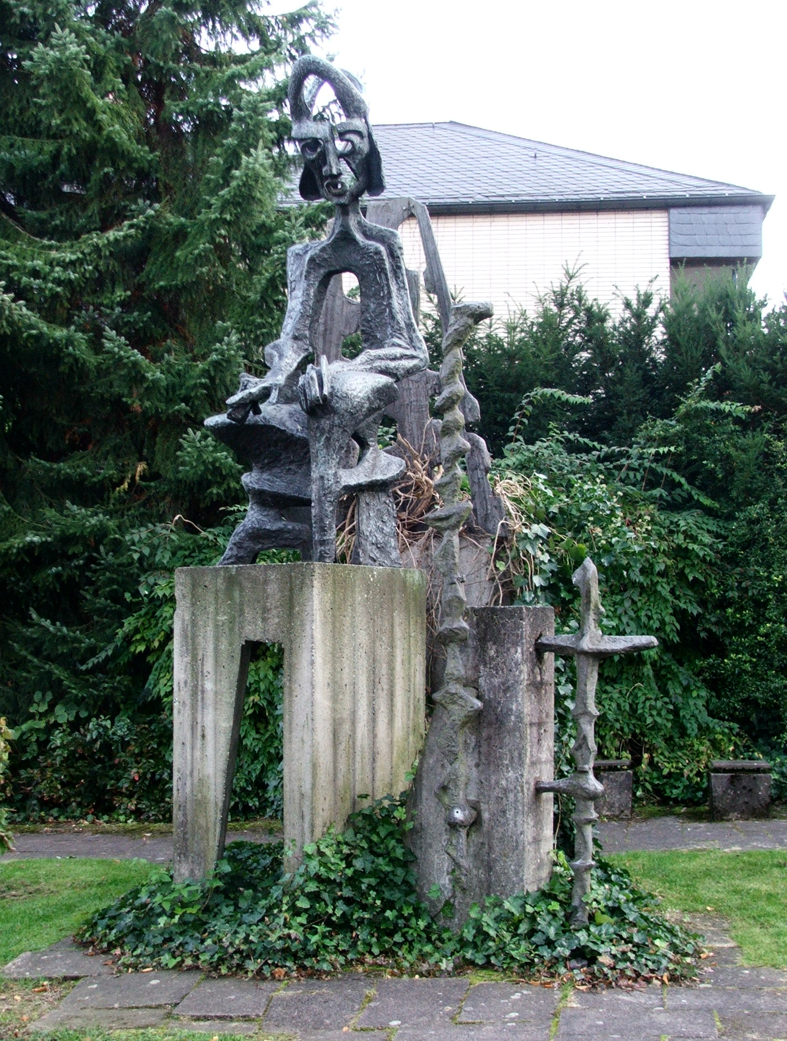 Erzbischof Engelbert von Köln, in Brilon